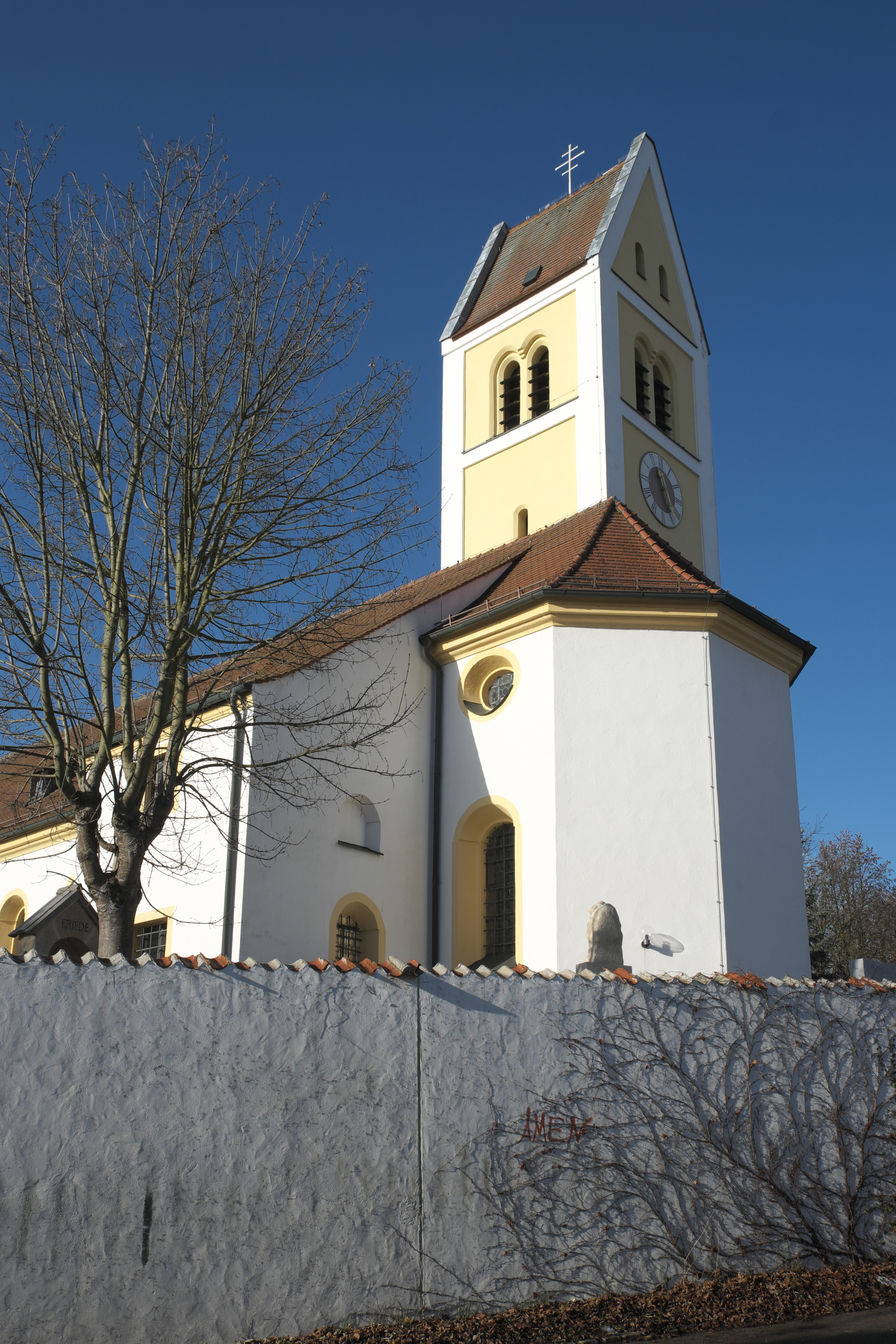 Katholische Pfarrkirche St. Laurentius in Petershausen im Landkreis Dachau (Bayern/Deutschland)